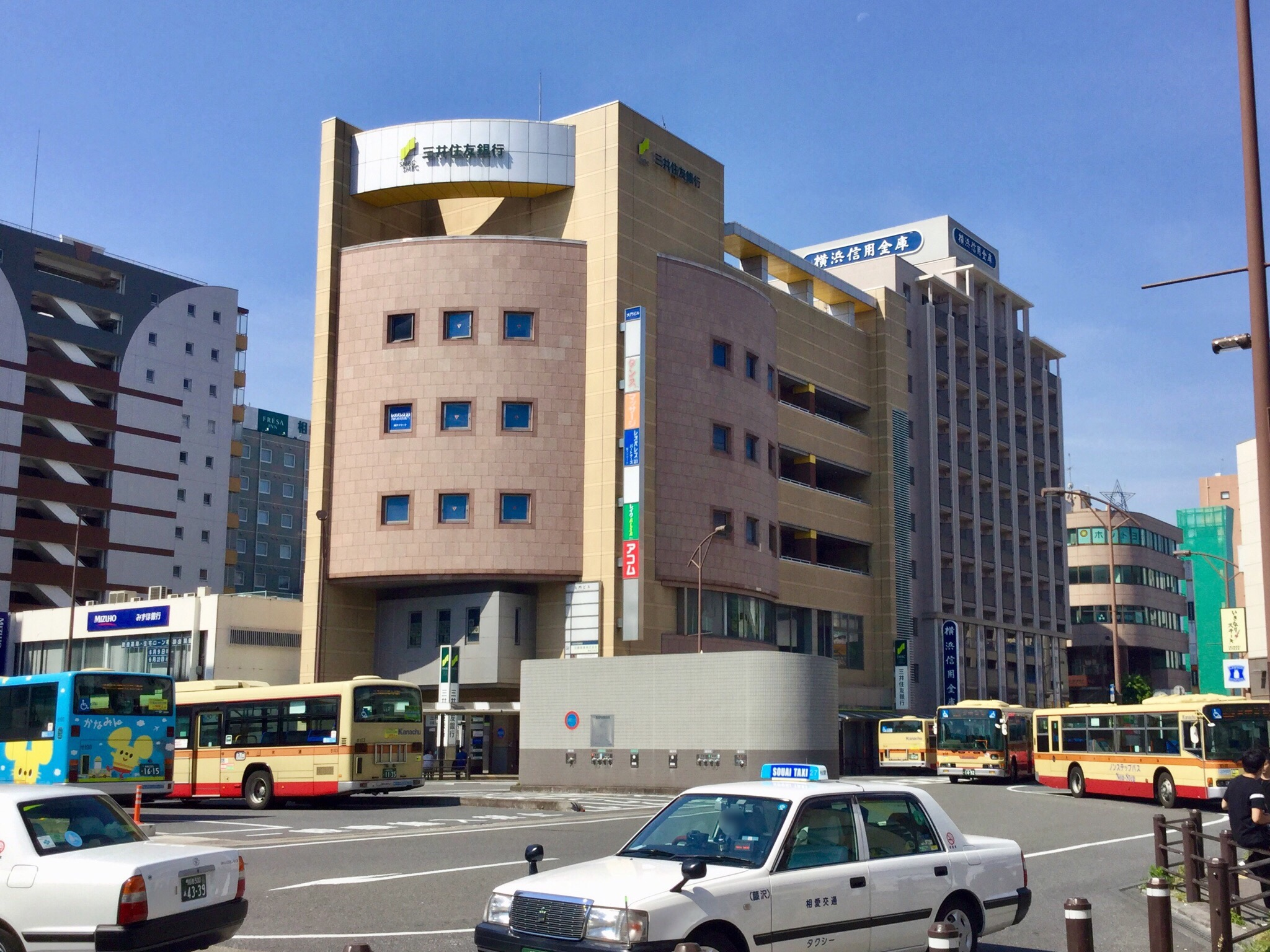 湘南台駅西口バスロータリー